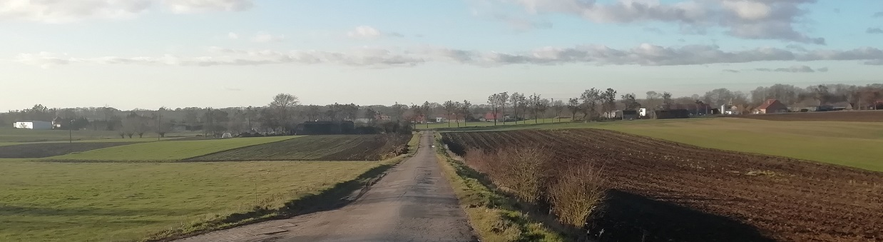 Panorama Bukowa (pow. sztumski)